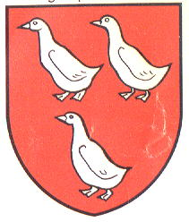 Wappen von Granges pres Marnand Kanton Waadt Schweiz